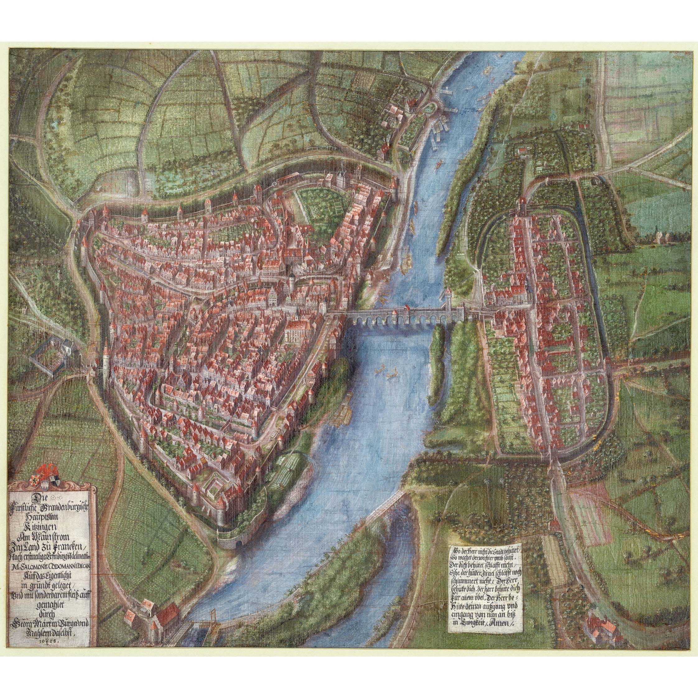 Stadtansicht von Kitzingen aus dem Jahr 1628; detailgetreu